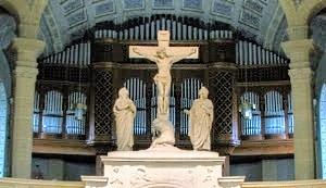 Christuskirche in Mannheim: Kreuzigungsgruppe und Orgel.